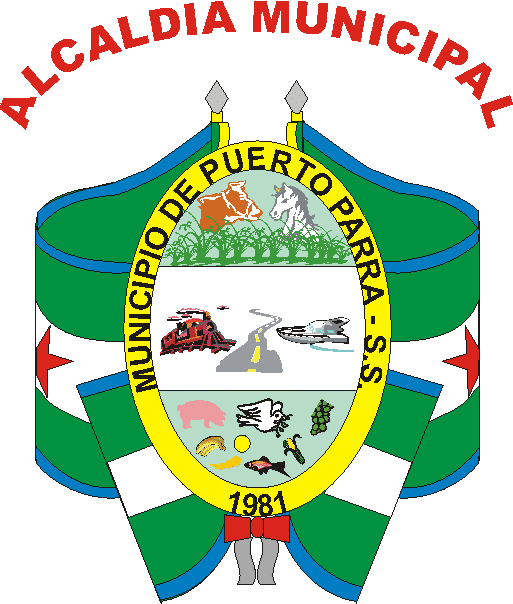 este es el escudo del municipio de puerto parra, santander